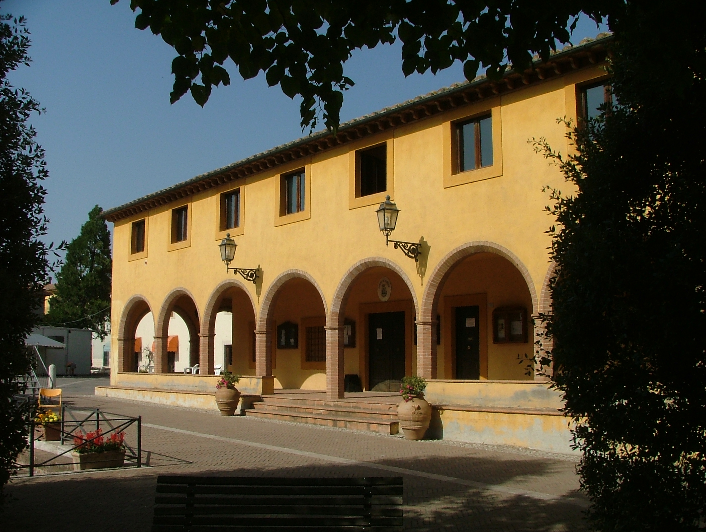 Palazzo dei Conti di Marsciano - Guardea (TR)